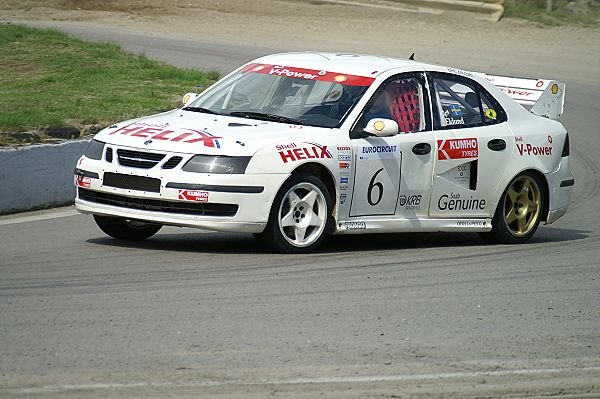 Eklund at EC Holland 2006 Valkenswaard, made by